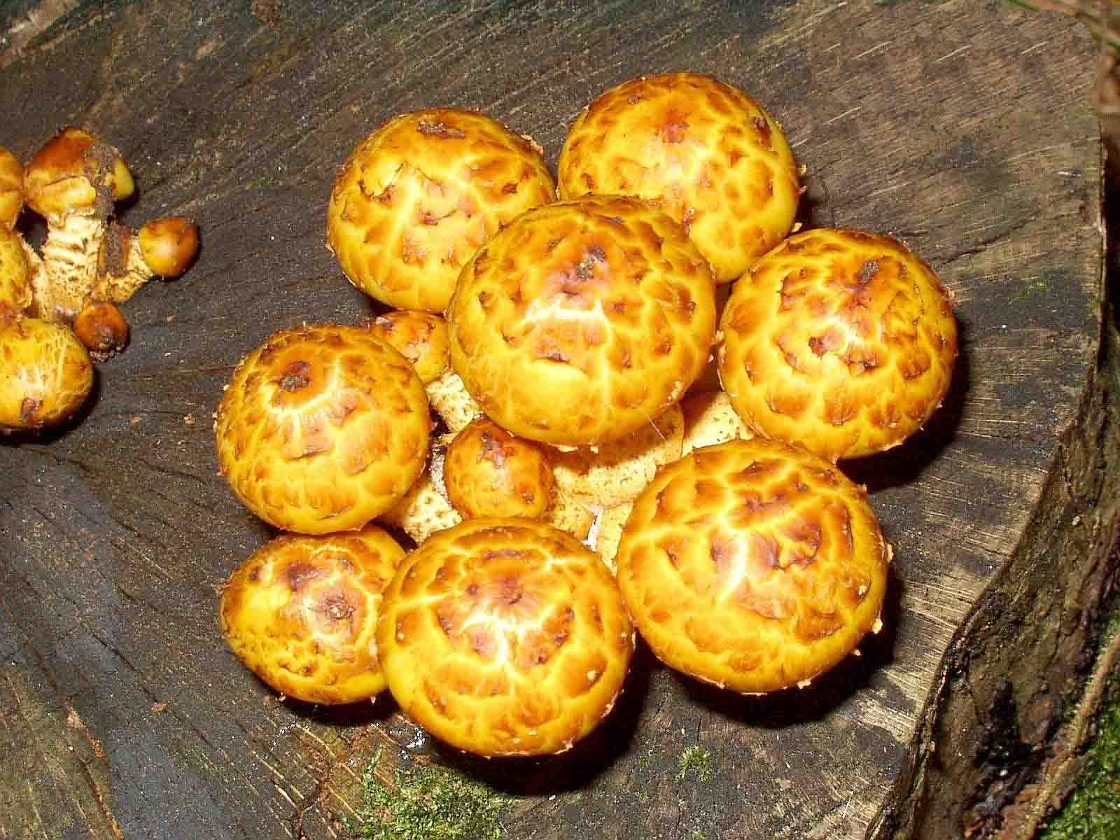 Pholiota aurivella in Unterfranken